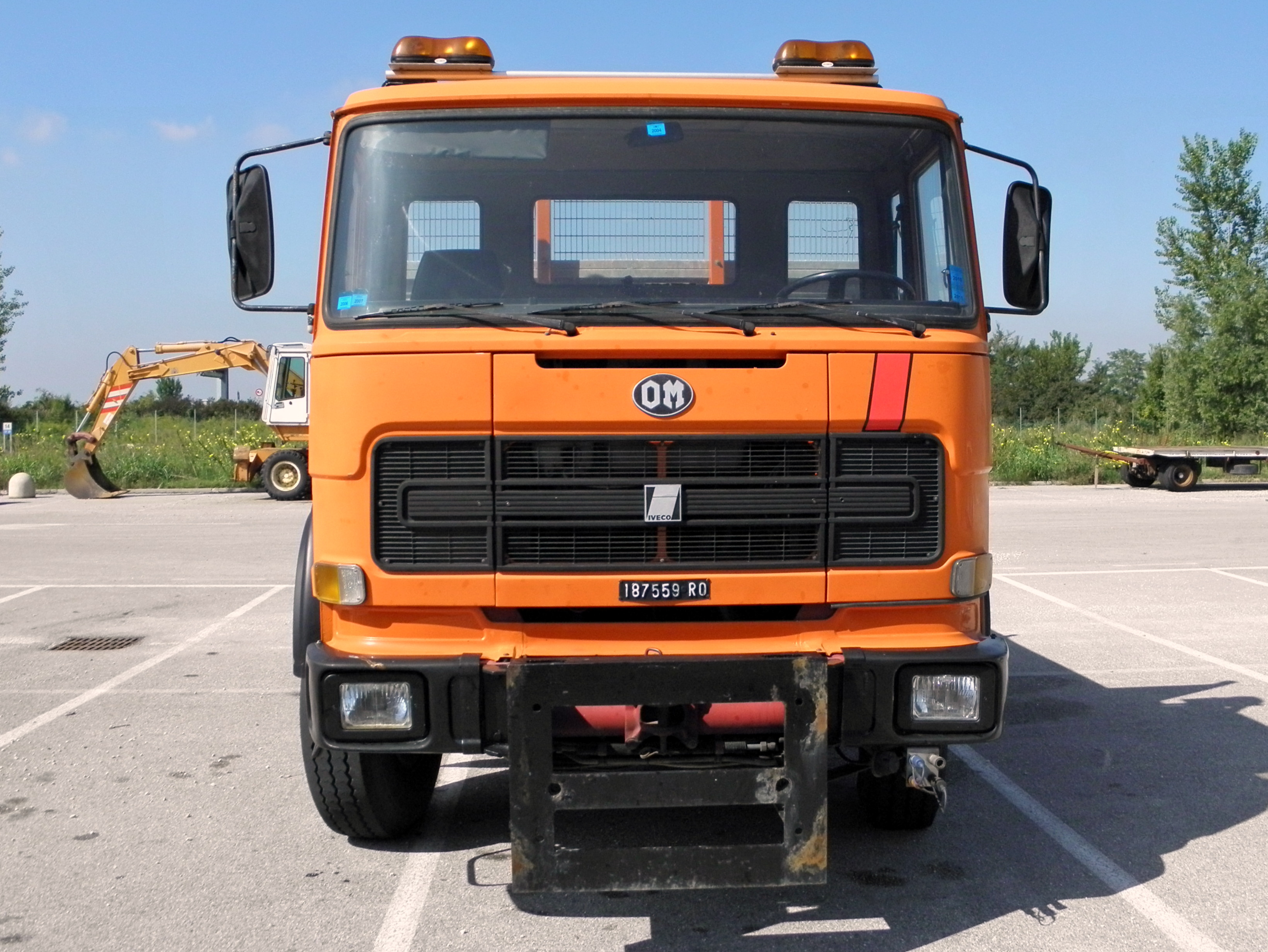 L'OM (Iveco) 160 OM 26 di proprietà dell'Amminstrazione Provinciale Rovigo.